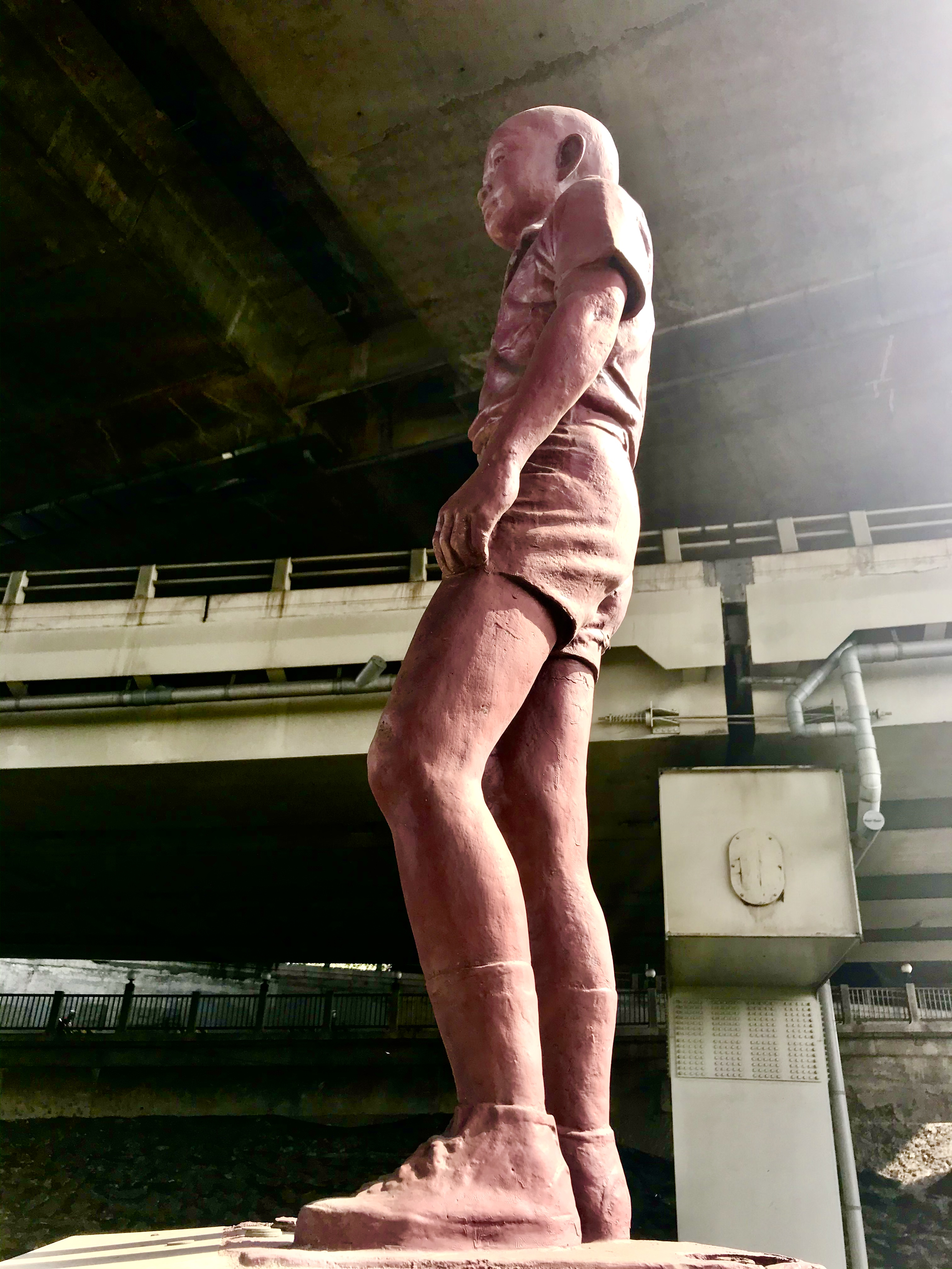 李再春銅像側照